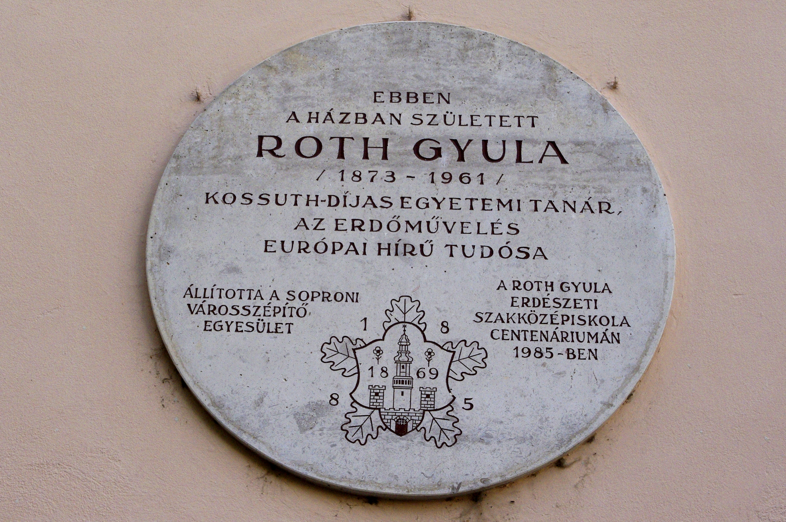 Sopron, Ungarn - Gedenktafel für Roth, Gyula in Sichtweite des Stadtturms an einem Haus am Vorderen Tor (Elökapu). This is a photo of a monument in Hungary, Identifier: 4757